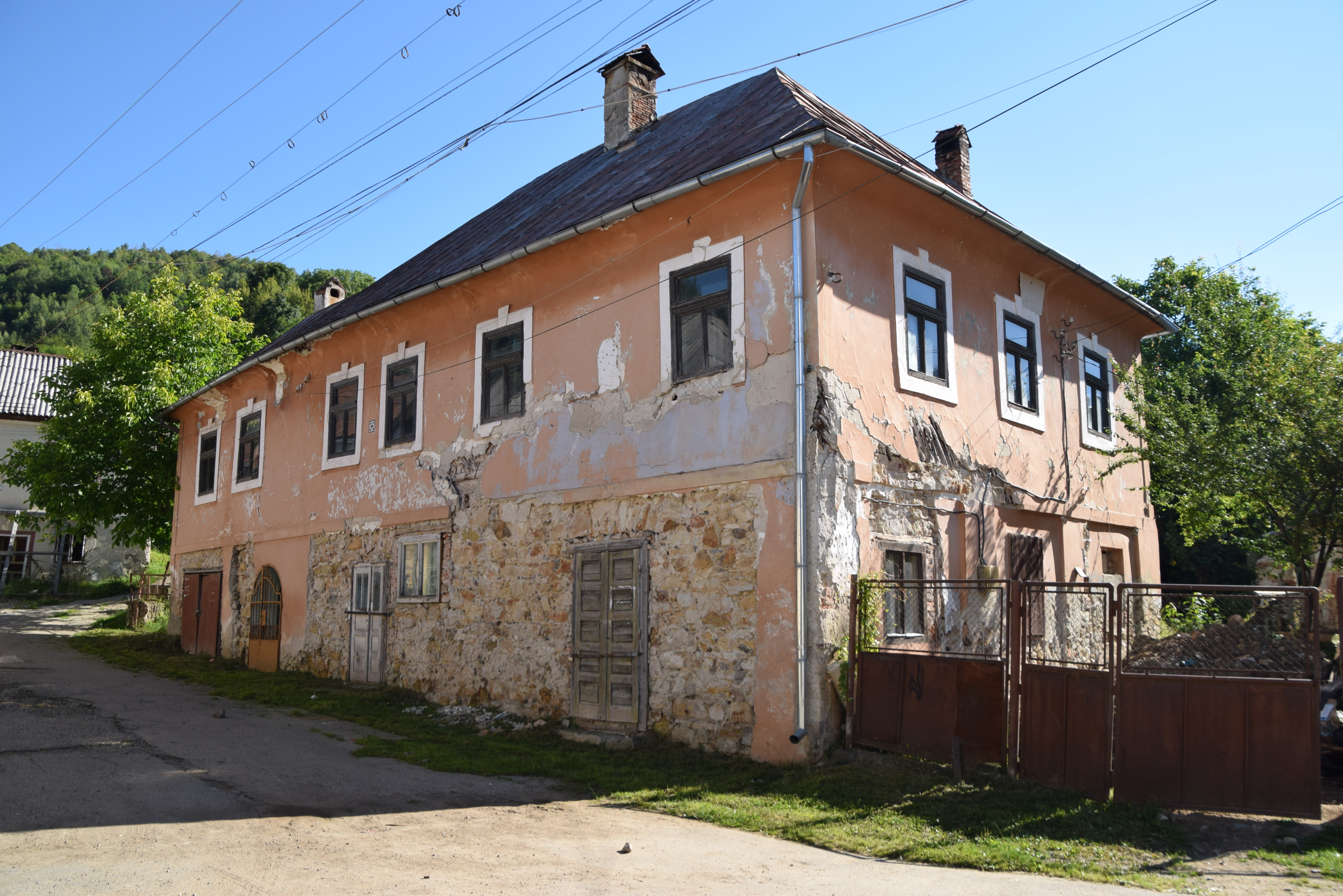 Casă, nr. 328 din Roșia Montană